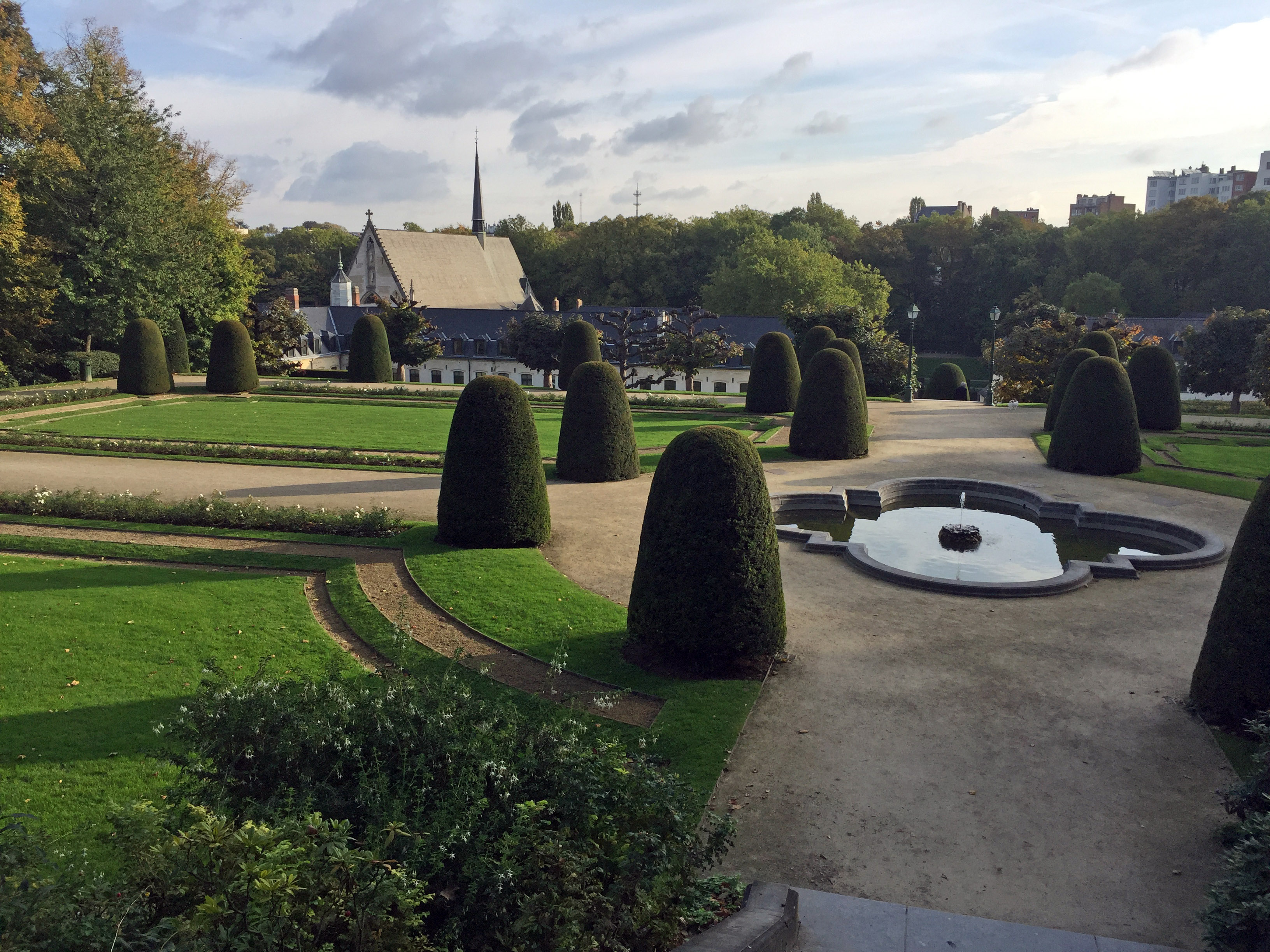 La Cambre Abbey